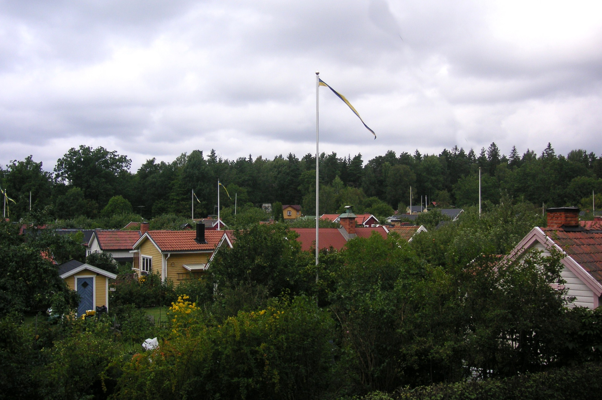 Orhems koloniträdgårdar